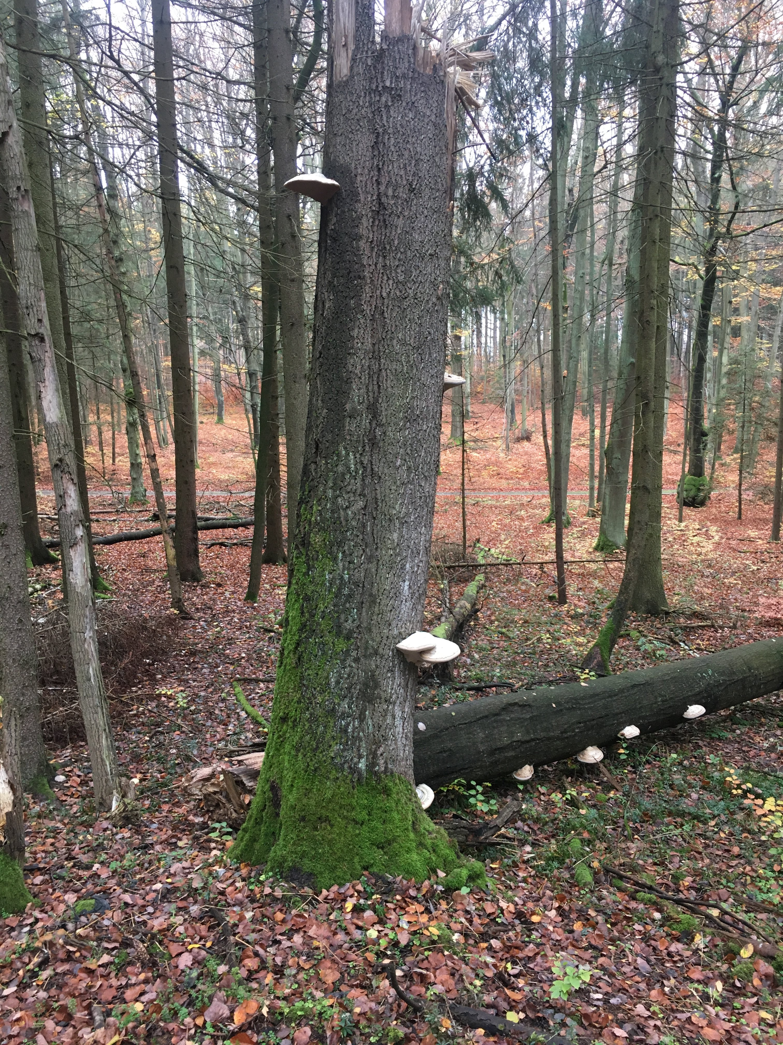 Hrby, přírodní rezervace